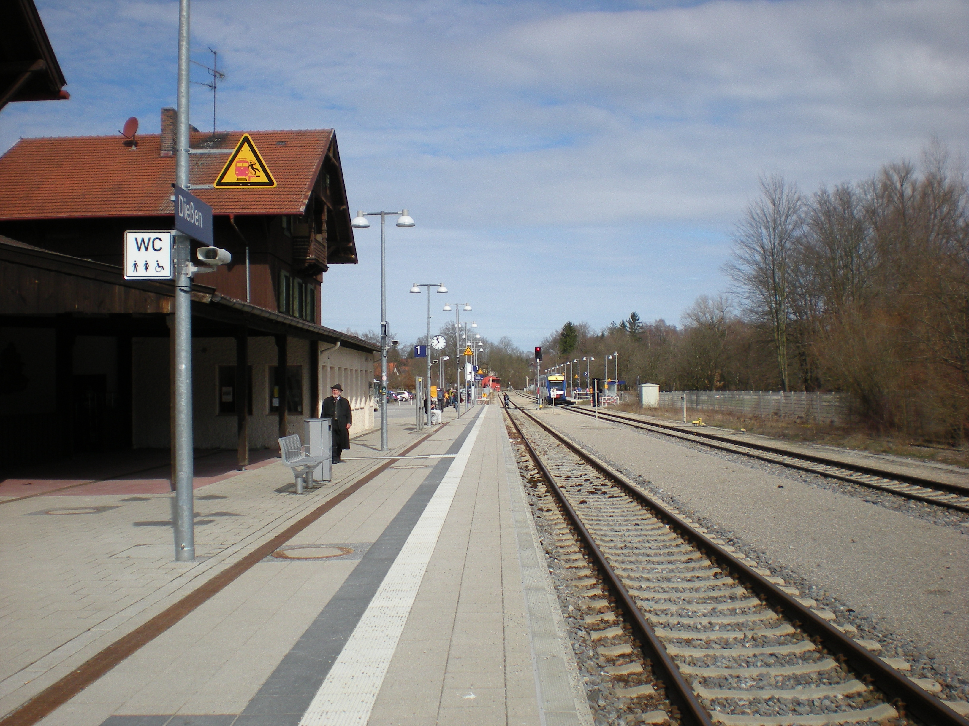 Hausbahnsteig des Bahnhofs Dießen, im Hintergrund Seitenbahnsteig mit Triebwagen der BRB